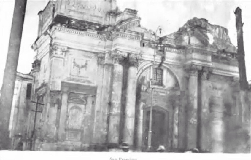 Iglesia de San Francisco en la Ciudad de Guatemala luego del terremoto de 1917-18